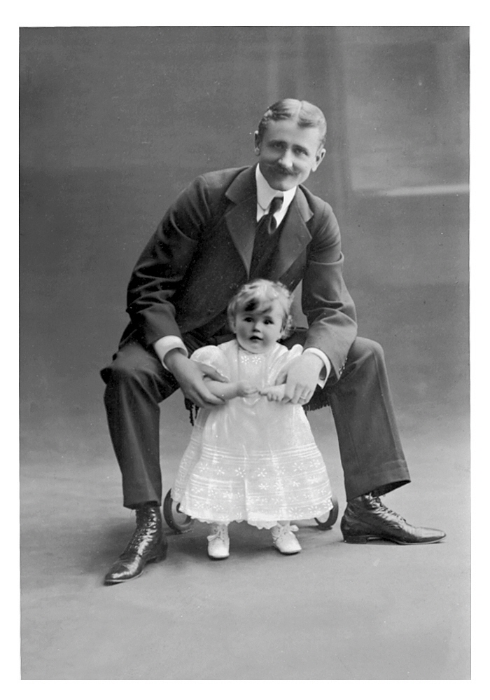 Wilhelm von Geijer tillsammans med dottern Margit von Geijer.